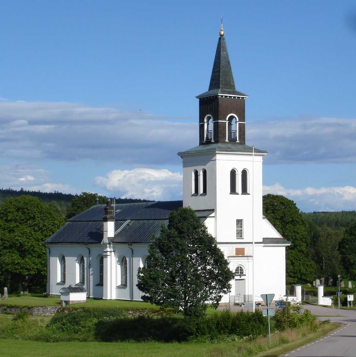 Sunds kyrka i Ydre kommun i Östergötland